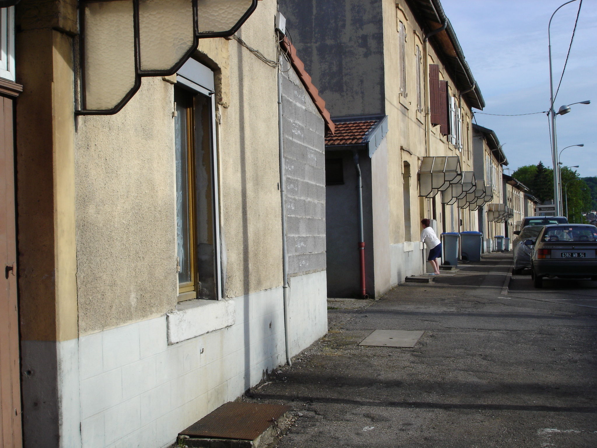 L'entrée nord de Pompey (Meurthe-et-Moselle) -- Photo amateur prise par moi-même